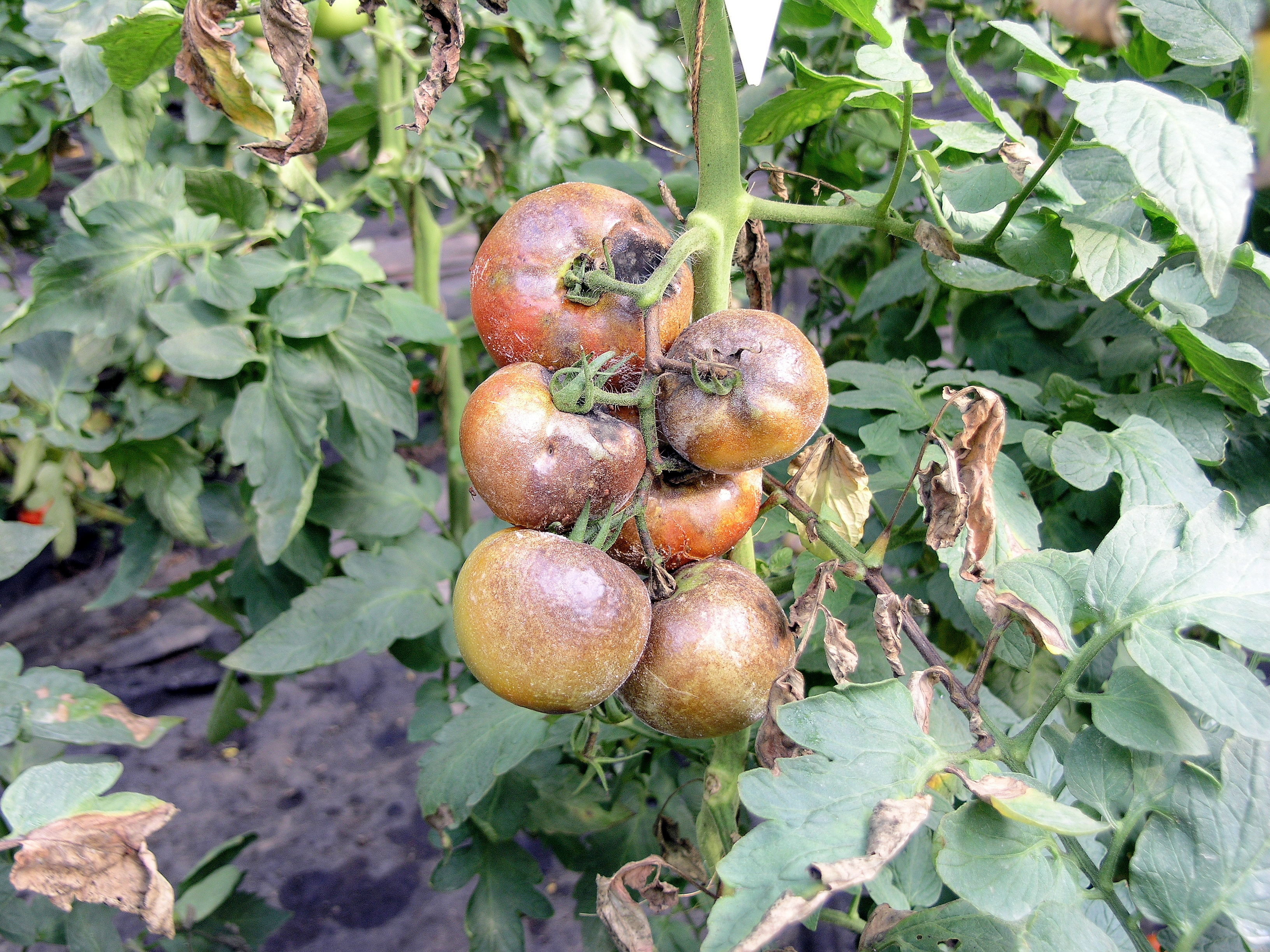 Tomaten Fruchtstand, Trieb und Blätter mit Kraut- und Braunfäule Phytophthora infestans